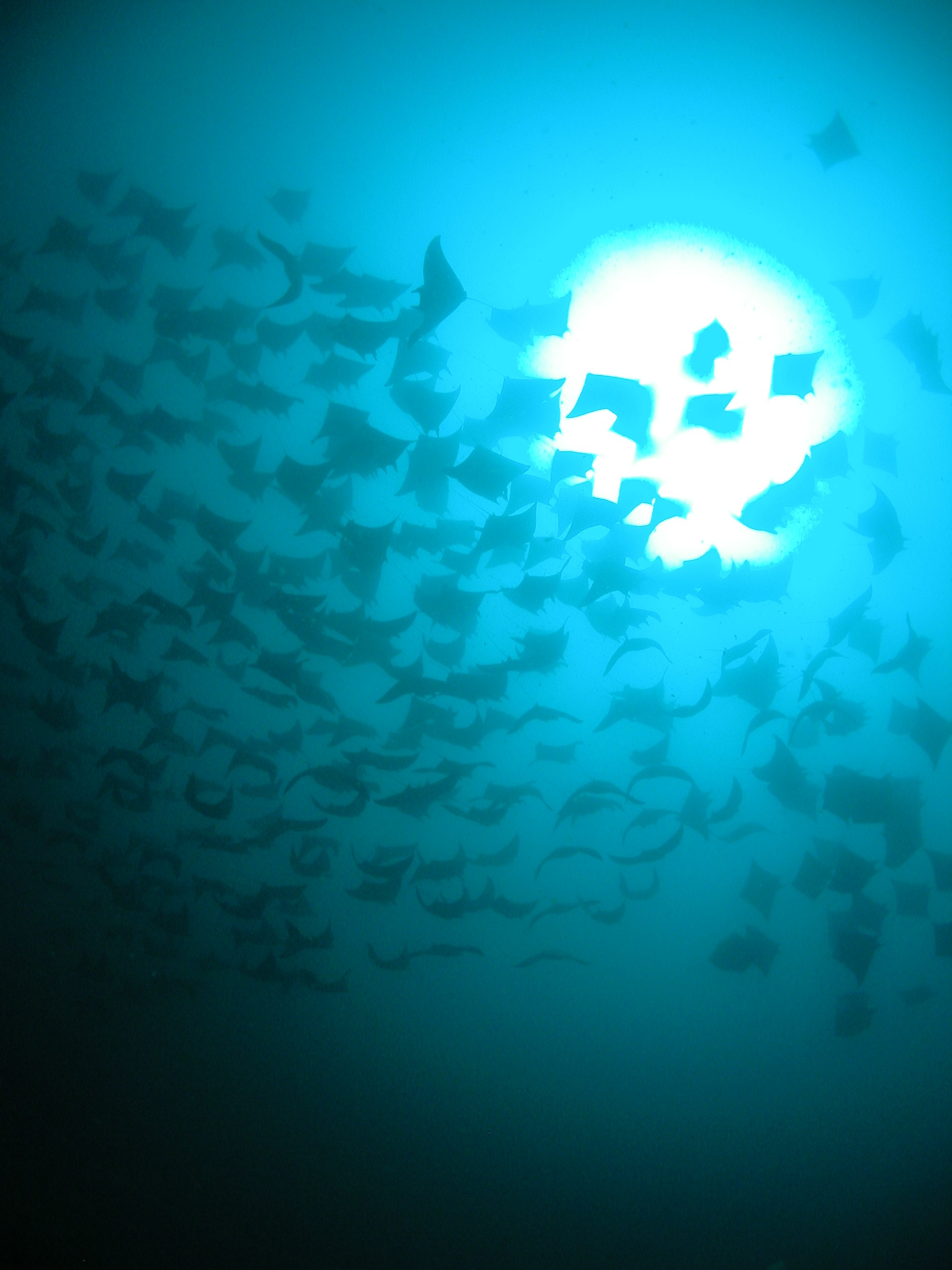 Mobula rays, La Paz, Mexico (イトマキエイのどれか)